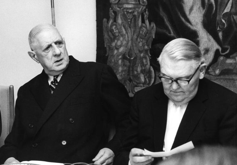 11.6.1965 Besuch des französischen Präsidenten de Gaulle bei Bundeskanzler Ludwig Erhard